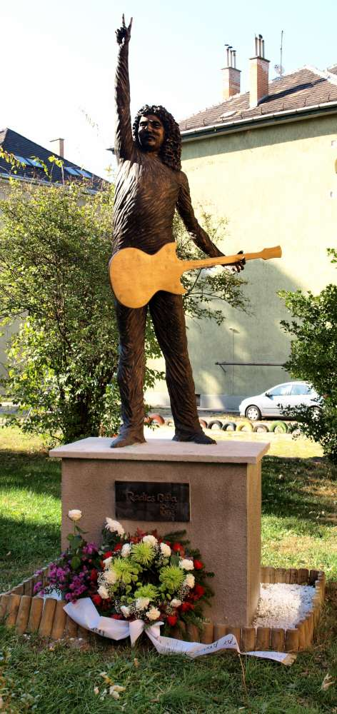 Radics Béla szobra, Kovacs Karoy alkotása, 2005.- Budapest XIII. kerület, Vőlegény u 2. Gyöngyösi út sarok. Bronz szobor. Beton, műkő talapzaton